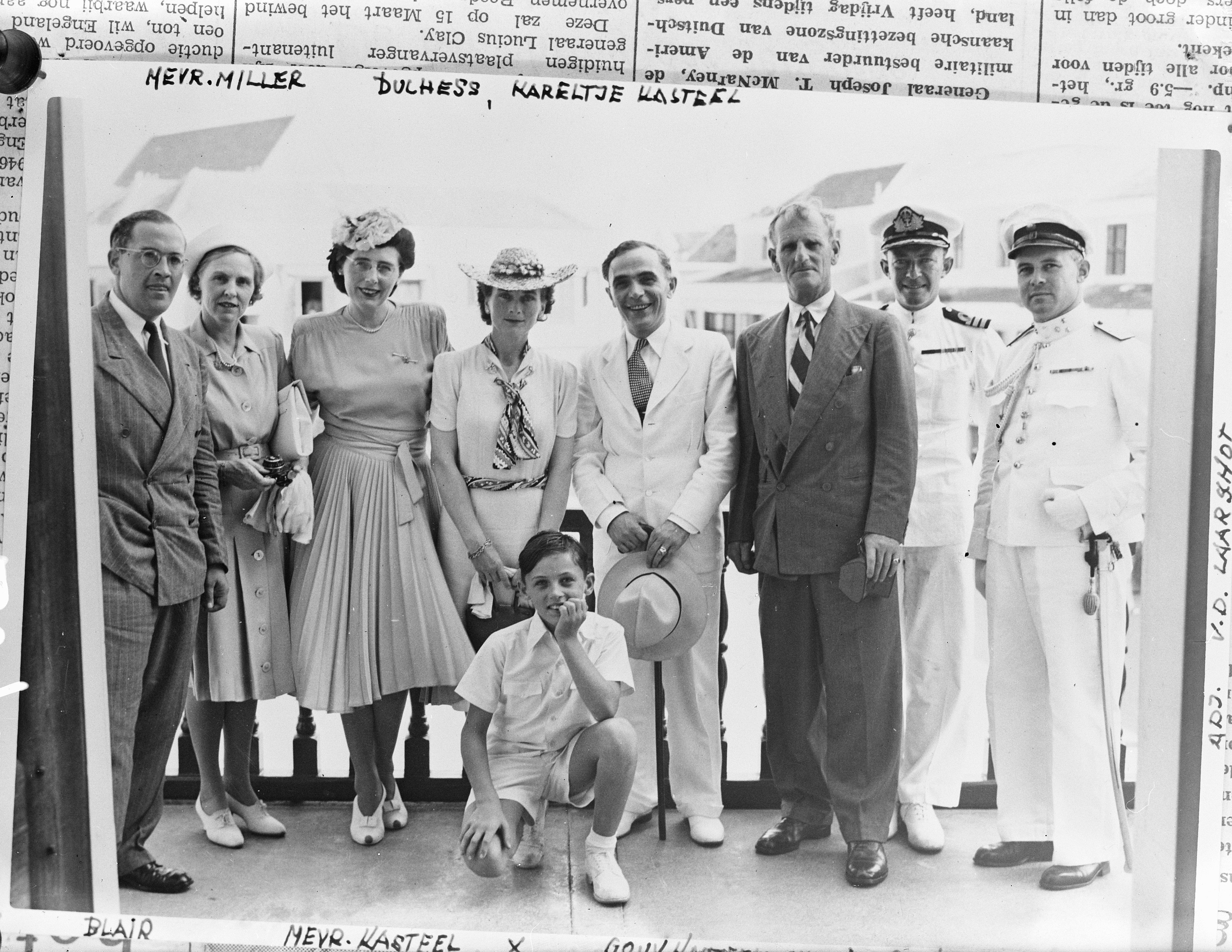 Collectie / Archief : Fotocollectie Anefo Reportage / Serie : [ onbekend ] Beschrijving : Prinses Alice van Gloucester bezoekt Curacao Datum : 16 maart 1947 Locatie : Curacao Persoonsnaam : Prinses Alice van Gloucester Fotograaf : Foto Fischer Auteursrechthebbende : Nationaal Archief Materiaalsoort : Glasnegatief Nummer archiefinventaris : bekijk toegang 2.24.01.09 Bestanddeelnummer : 902-0716